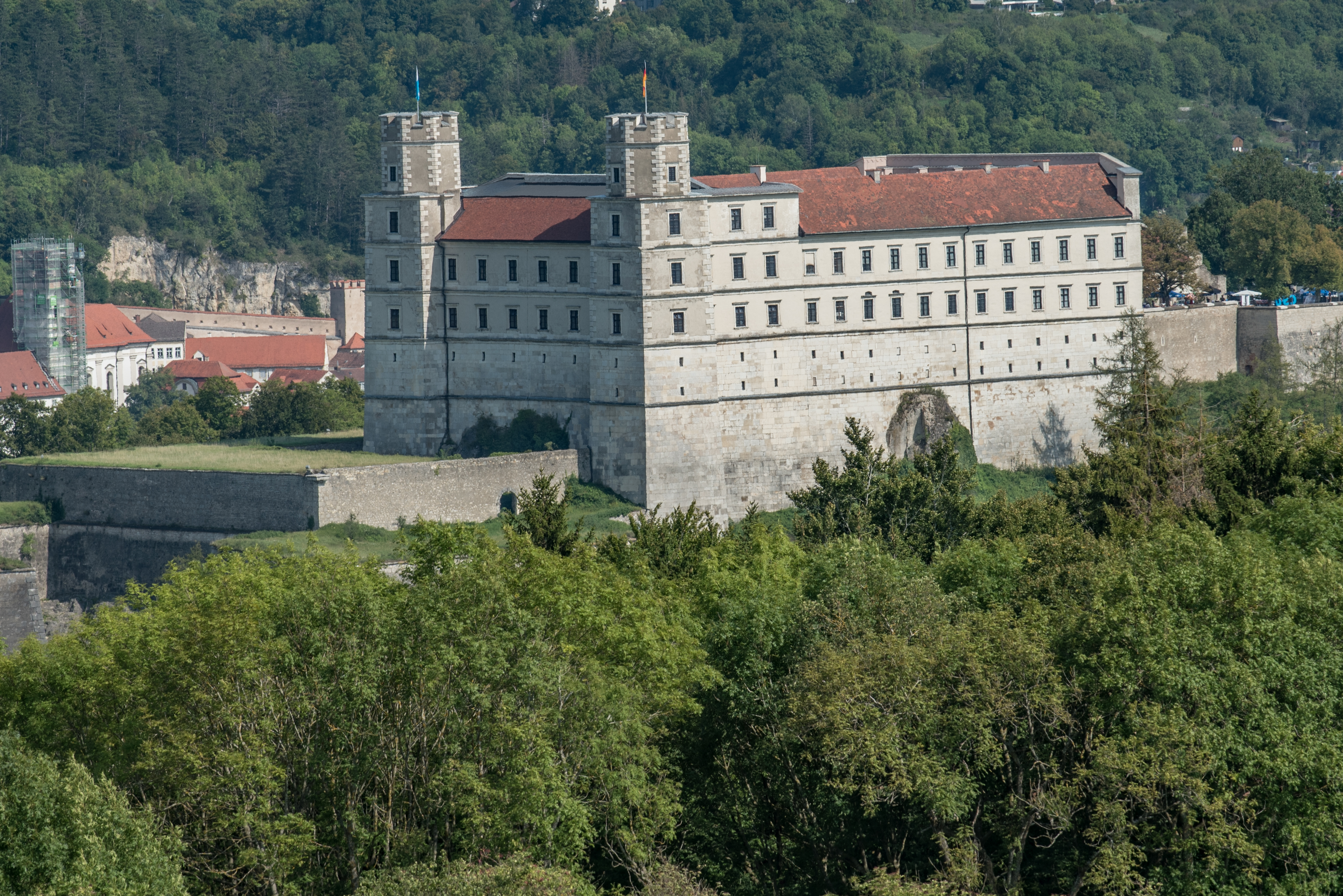 Eichstätt, Willibaldsburg, Ansicht von Westen